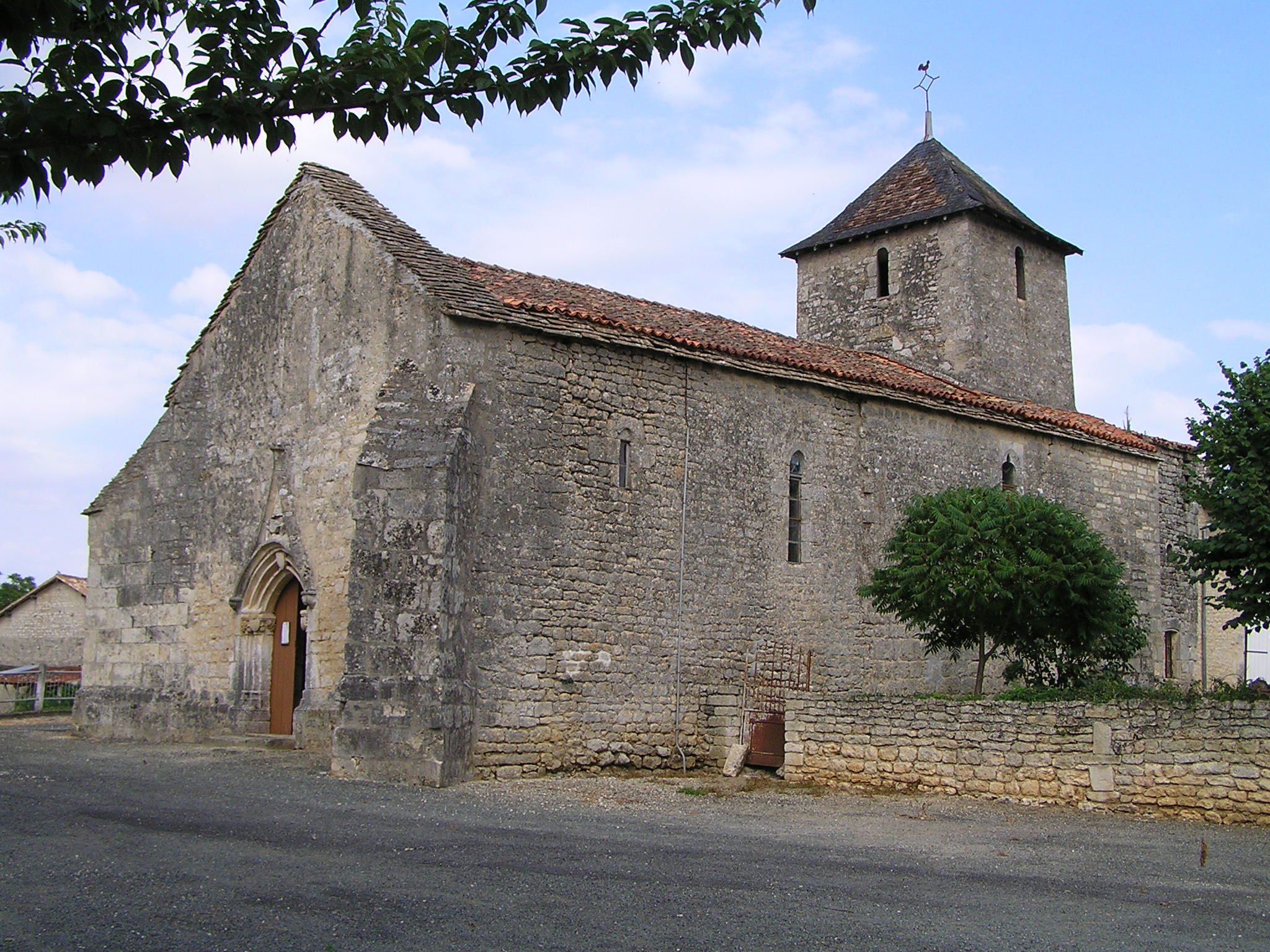 église de Villiers le Roux